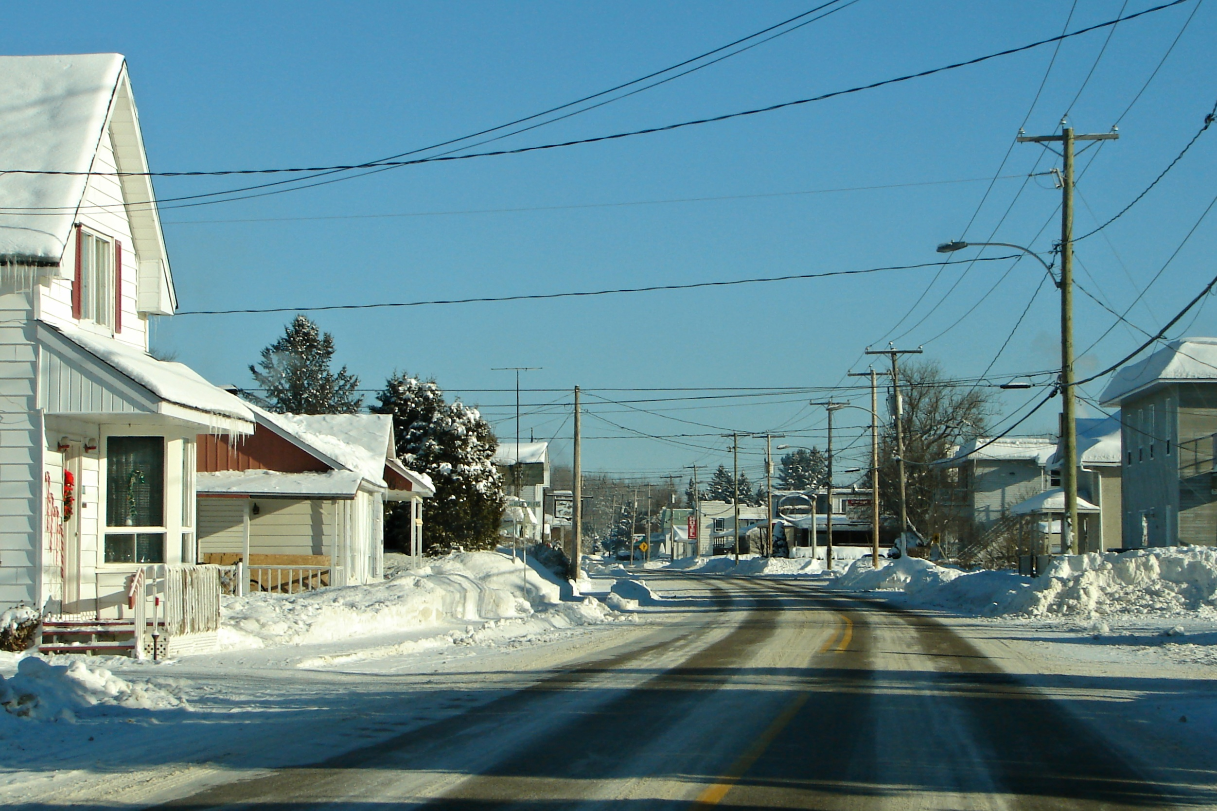 Val-Barrette (Municipality of Lac-des-Écorces), Quebec, Canada